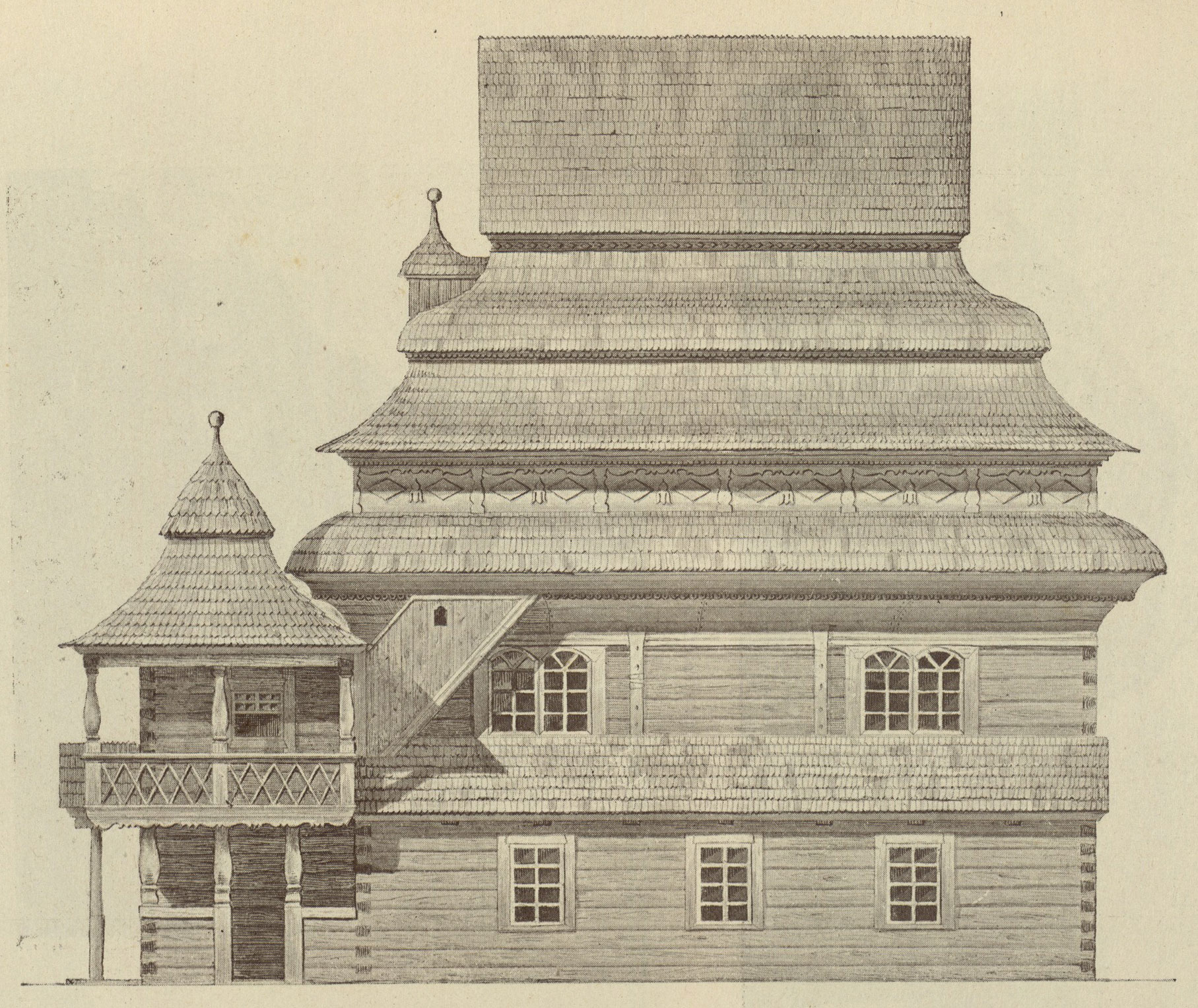 Беларуская (тарашкевіца): Нароўля (Naroŭla). Сынагога